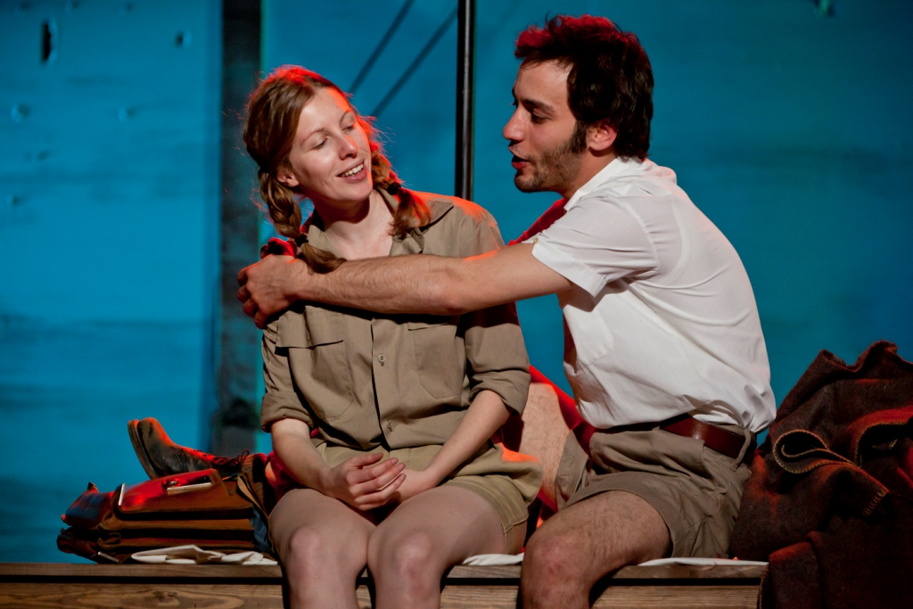 גניה סנופ בבין לילה ובין שחר